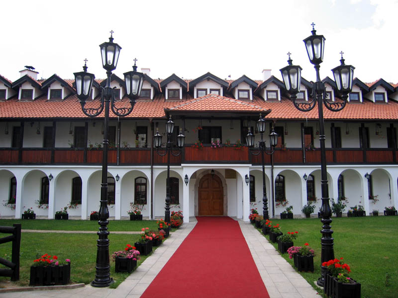 Konaci u manastiru Mileševa